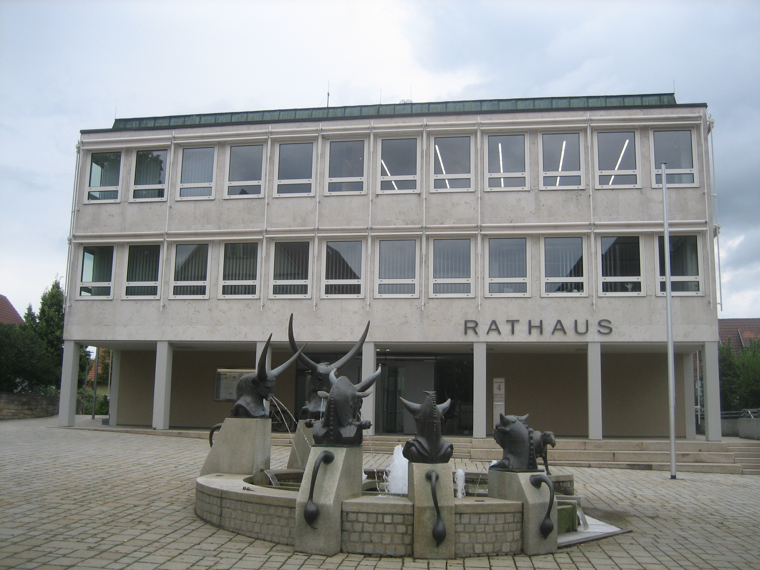 Rathaus Dettingen unter Teck mit Rathausbrunnen